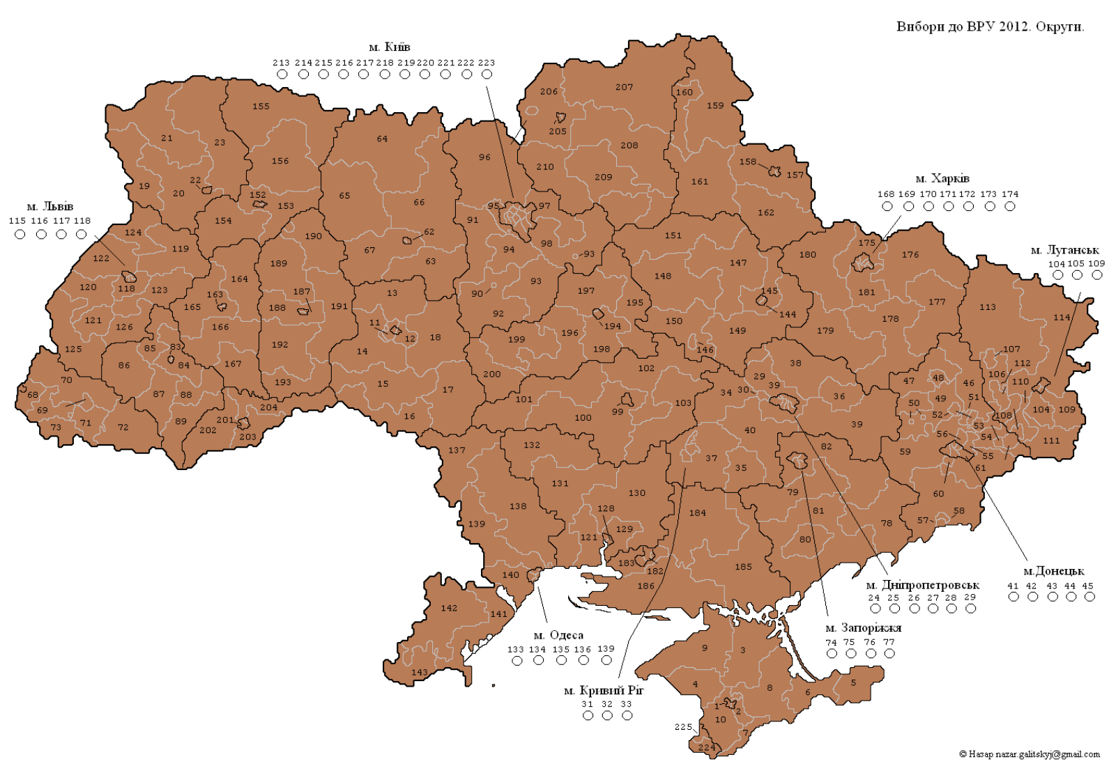 Україна. Парламентські вибори 2012 Виборчі округи.